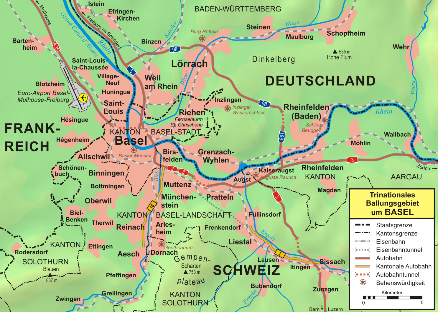 Topographische Karte vom Großraum Basel